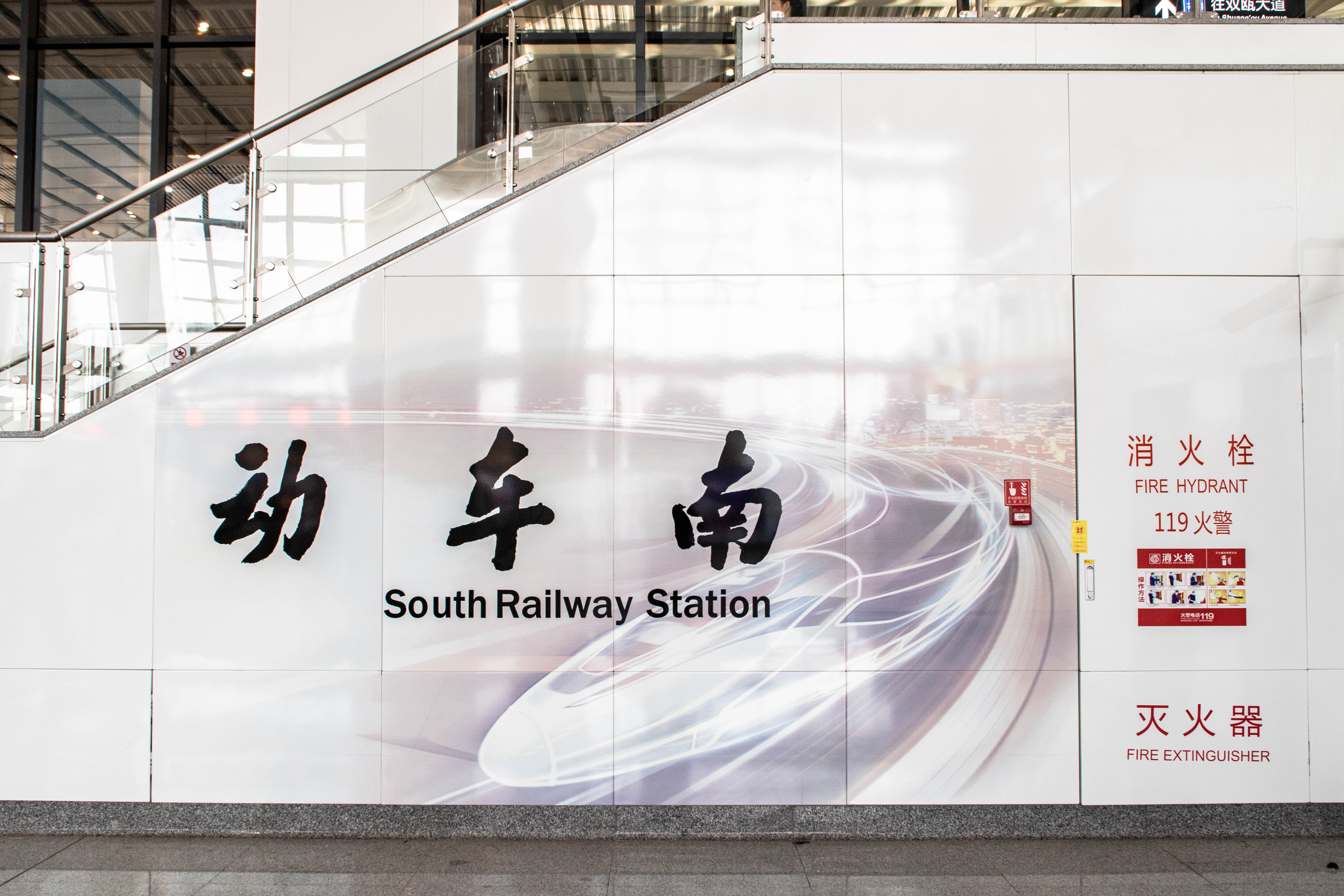 中文（中国大陆）: 动车南站站名壁